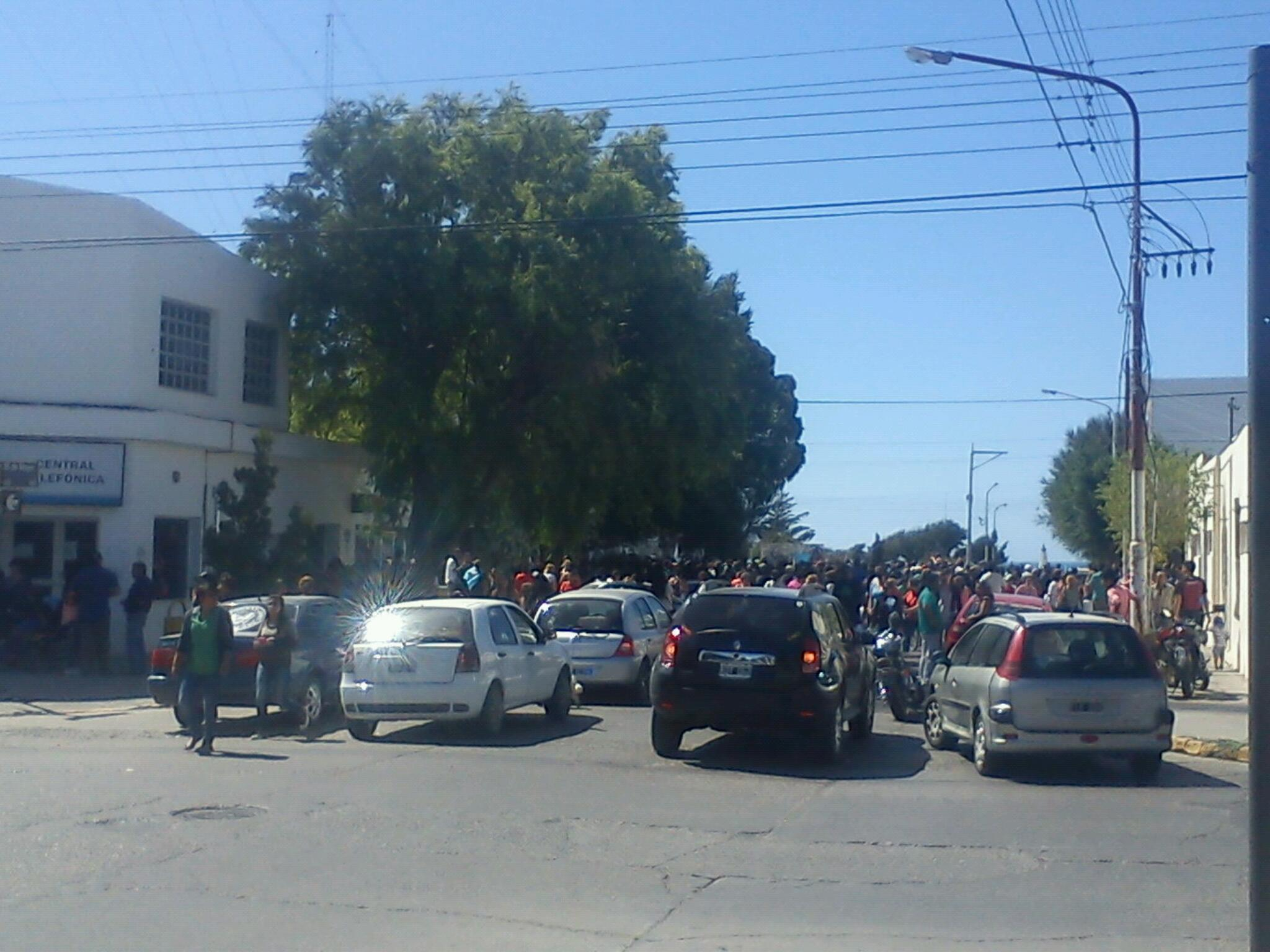 Situacion de la escasez de agua